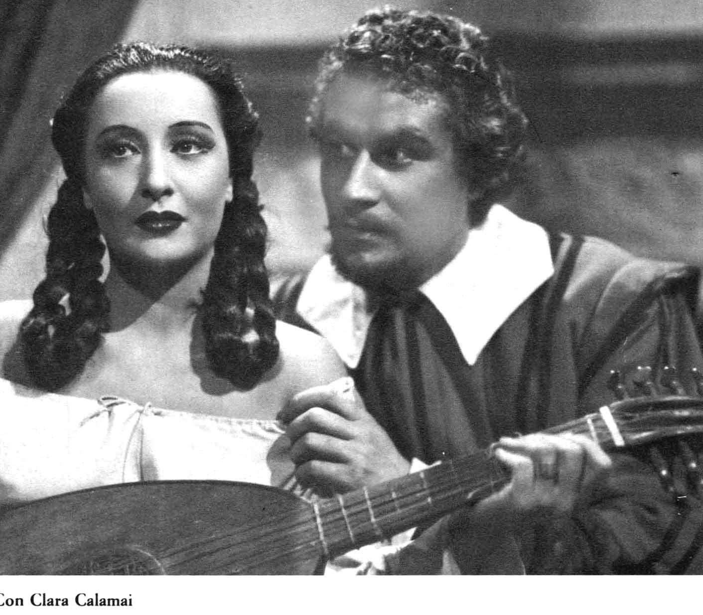 Clara Calamai e Amedeo Nazzari in Caravaggio, il pittore maledetto (Alessandrini, 1941)